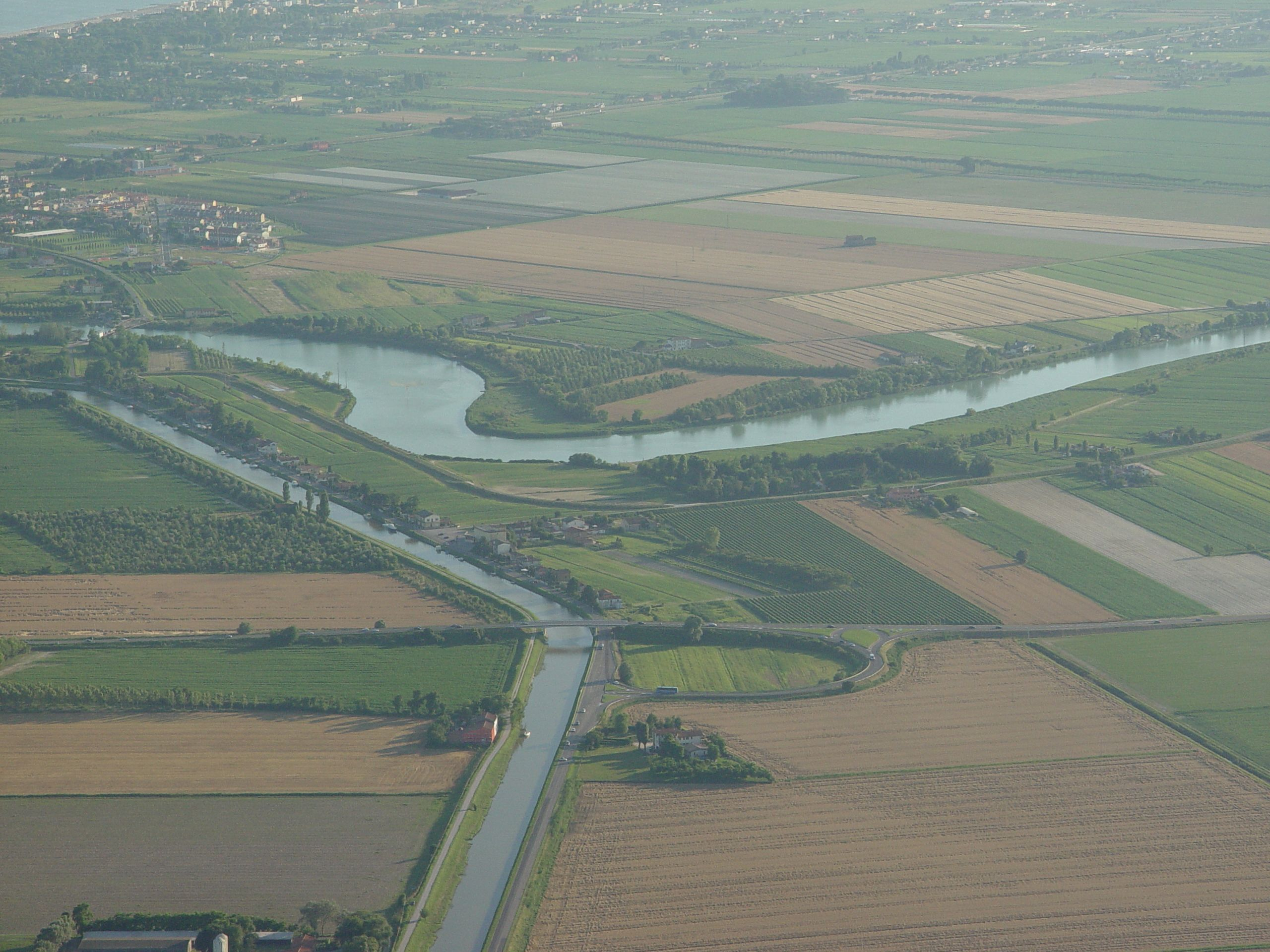 Foto di Piave e Revedoli tra Eraclea e Jesolo vista dalla mongolfiera.